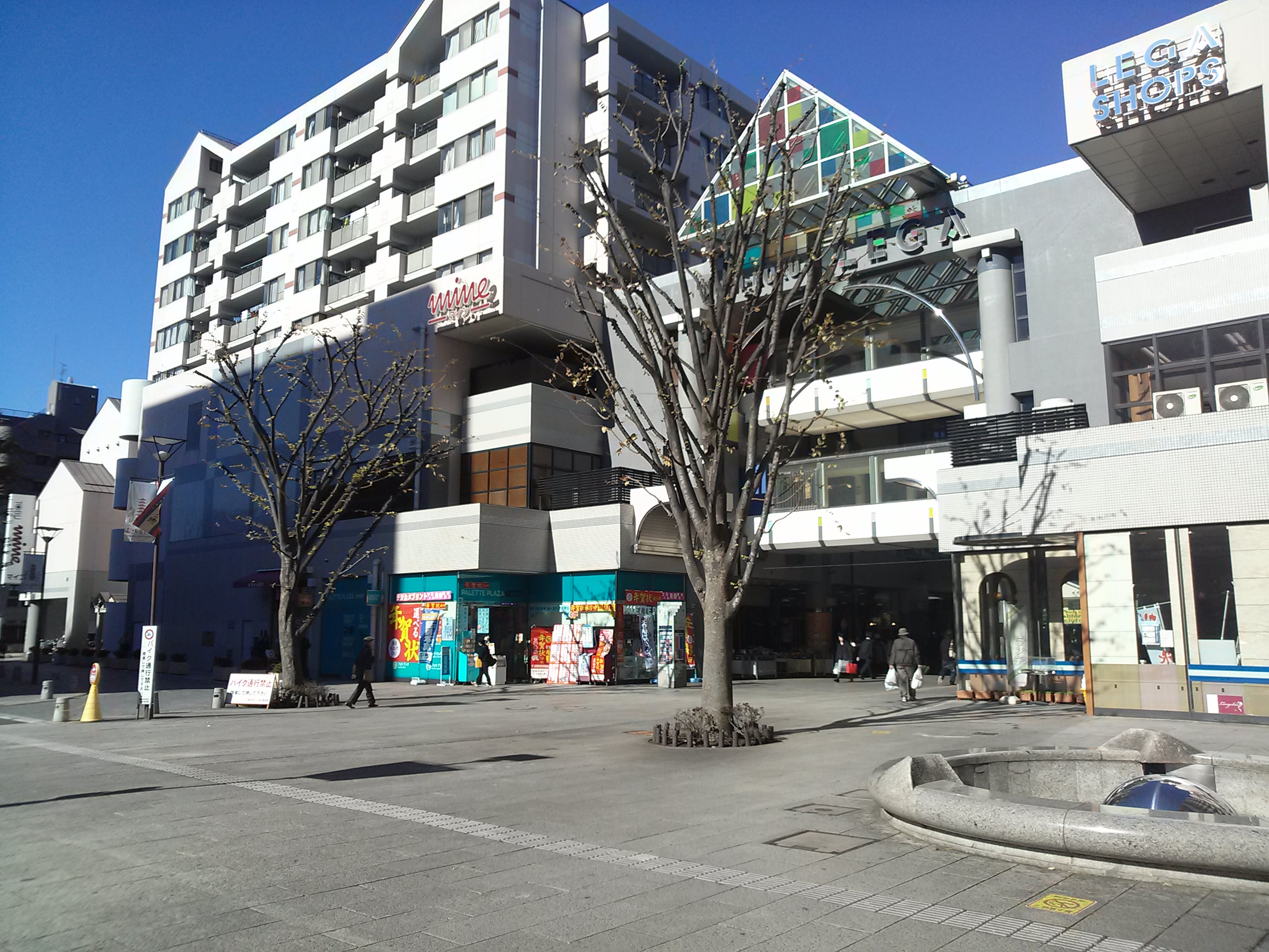 Nishi-Kokubunji Lega, 西国分寺レガ